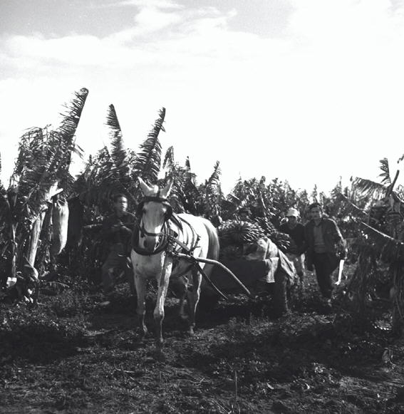 רמת הכובש - מטעי בננות.